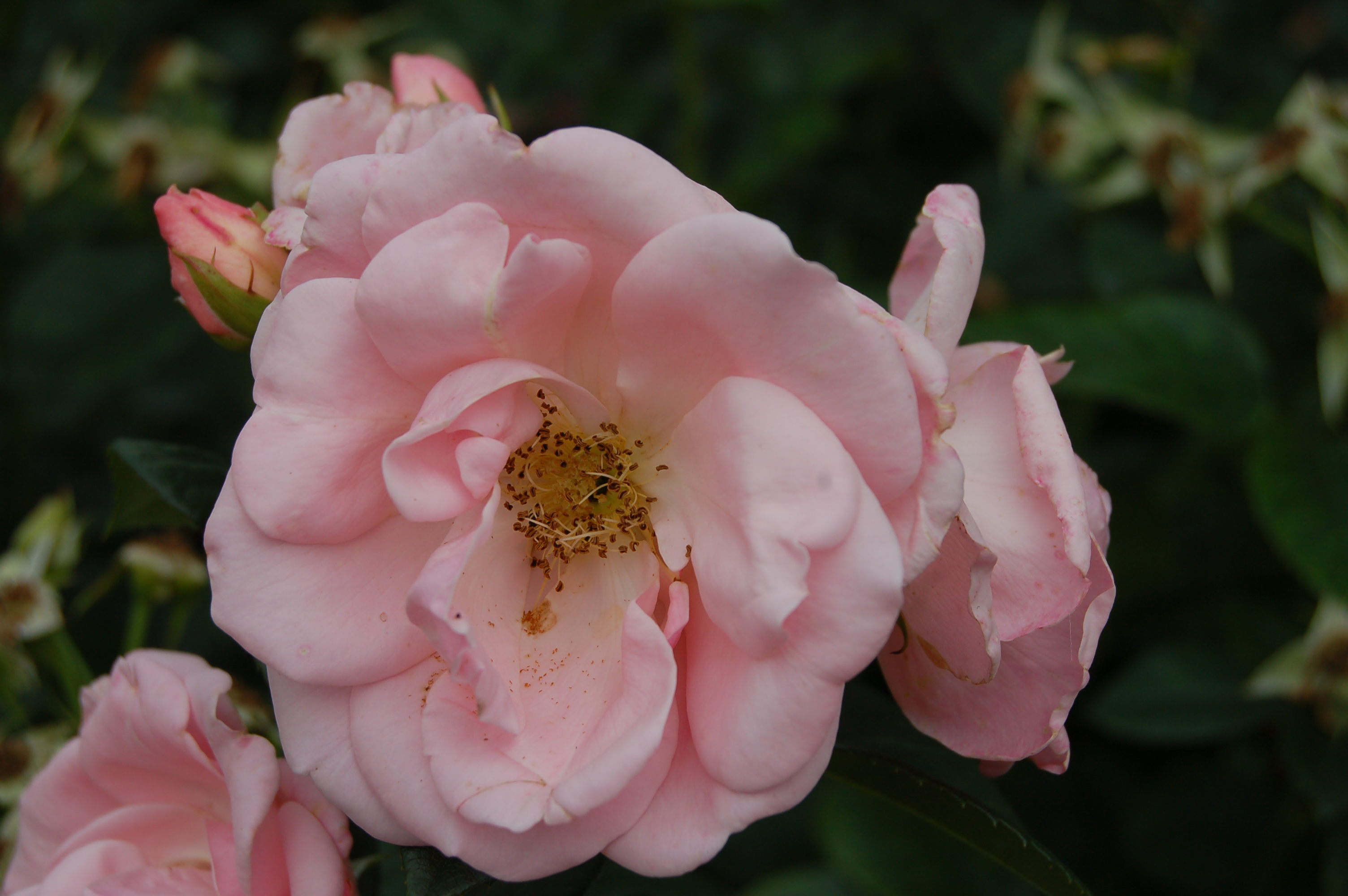 Rosa 'Pippi Långstrump'